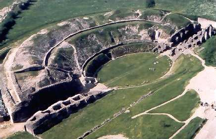 Amphithéâtre de Grand de GODARD Florian